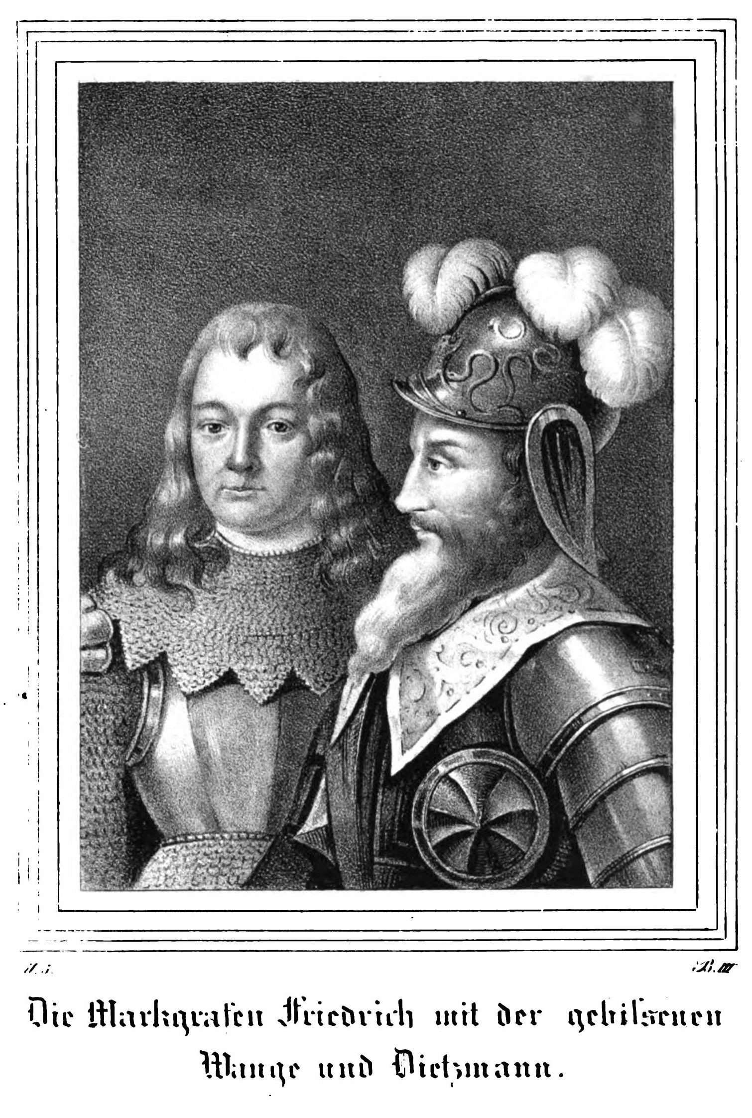 Saxonia Museum für saechsische Vaterlandskunde. Band 2. Dresden: Pietzsch und Comp. Siehe File:Saxonia Museum für saechsische Vaterlandskunde II.djvu